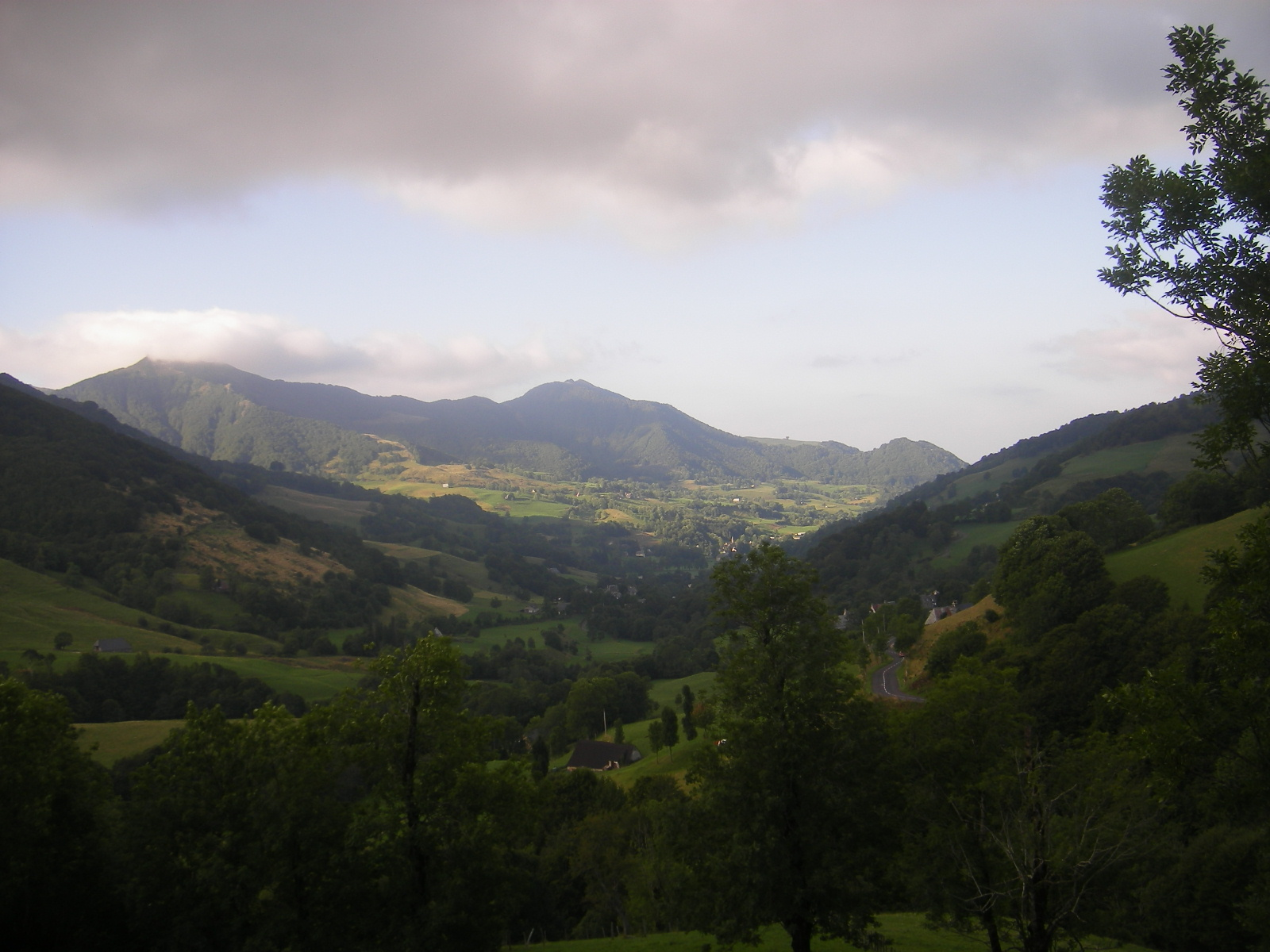 Between Mandailles and Col de Redondet (Mandailles Valley)